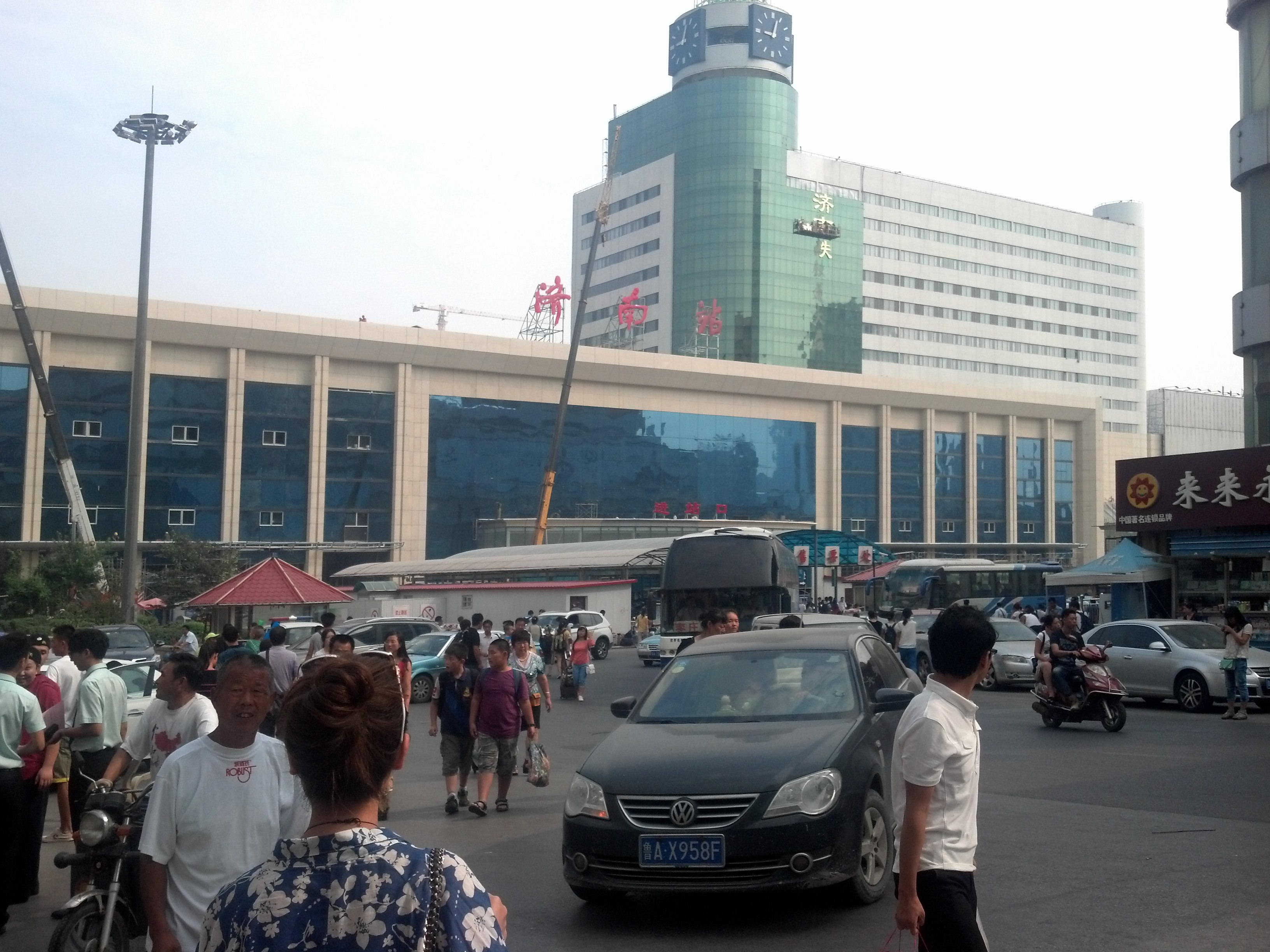 济南火车站